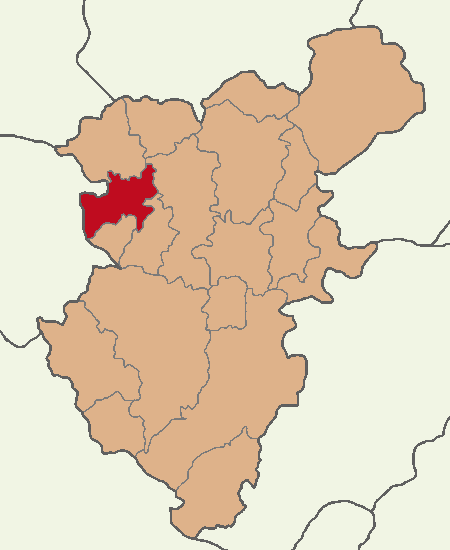 Sarayköy ilçesinin konumu